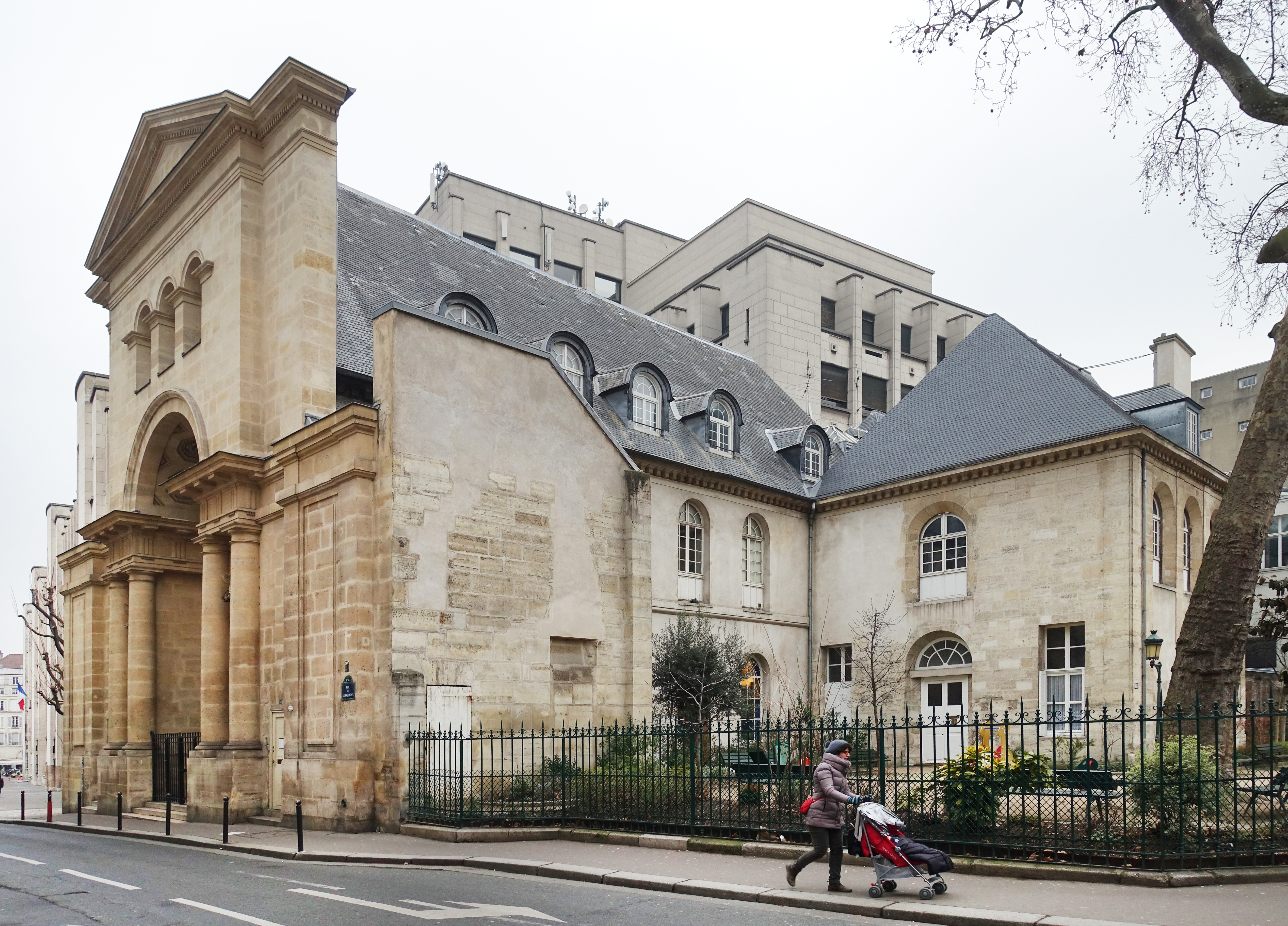 Cathédrale Saint-Volodymyr-le-Grand @ Paris